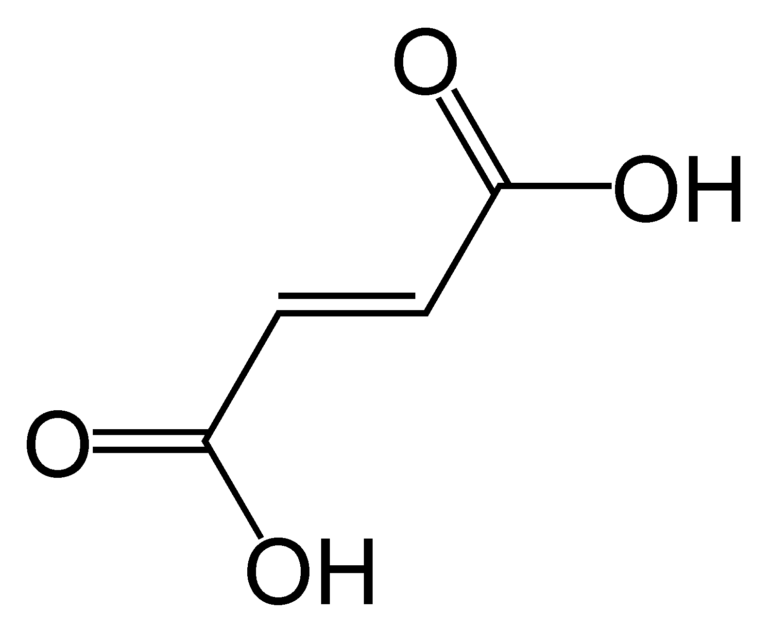 El ácido E-2-butenodioíco (Ácido Fumárico Chemical structure of fumaric acid. Created by Mysid in ChemDraw on September 14, 2005. GFDL.